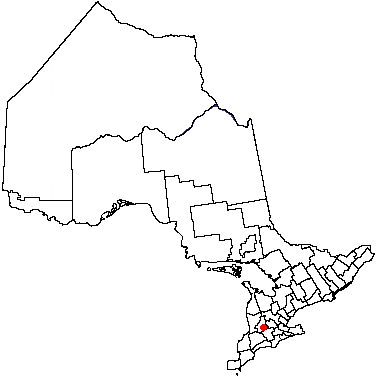 Volapük: Topam in provin: Ontario.